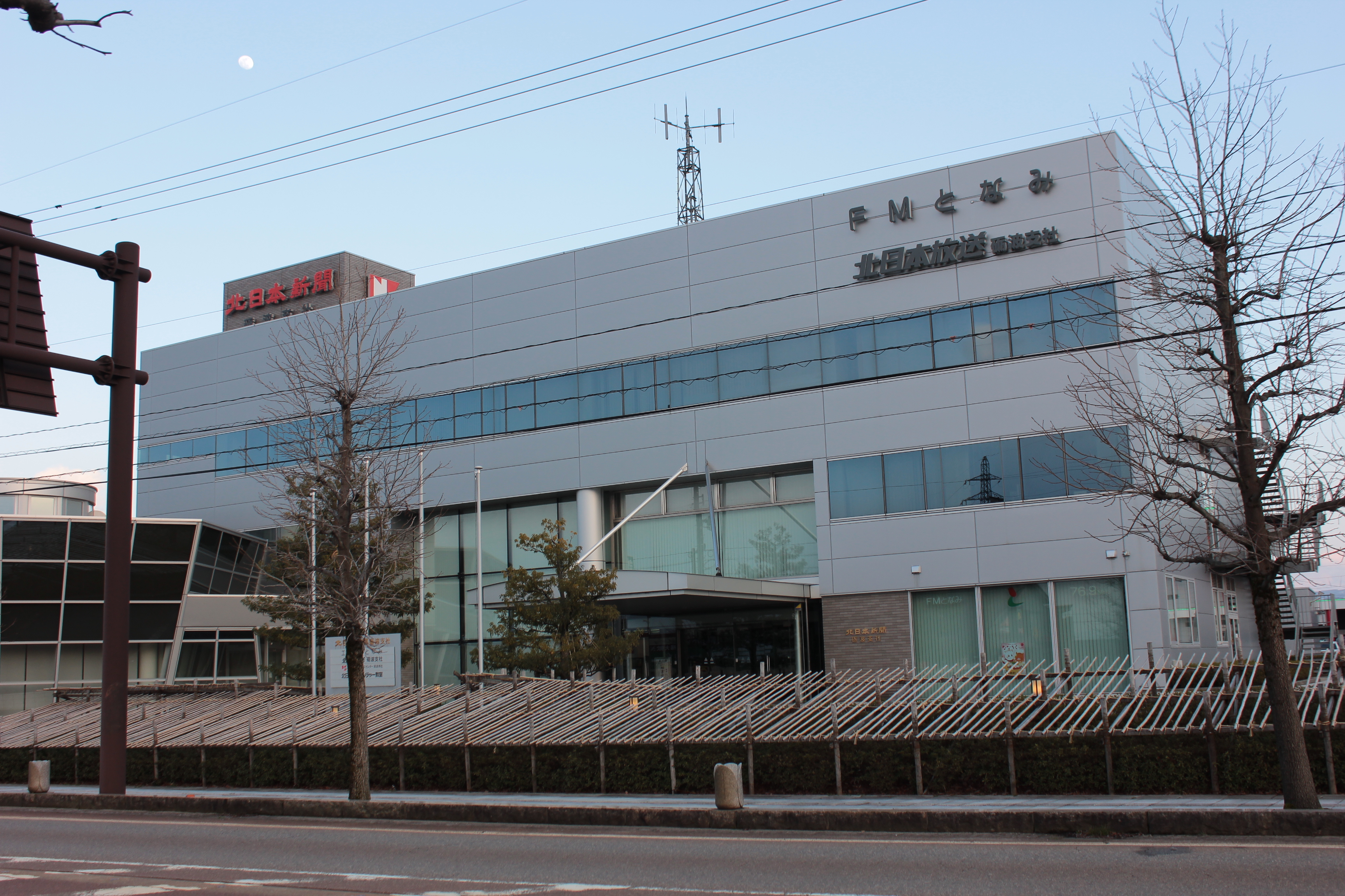 FMとなみ（富山県砺波市）、北日本新聞社と北日本放送の支社も併設されている。 Canon EOS Kiss X5